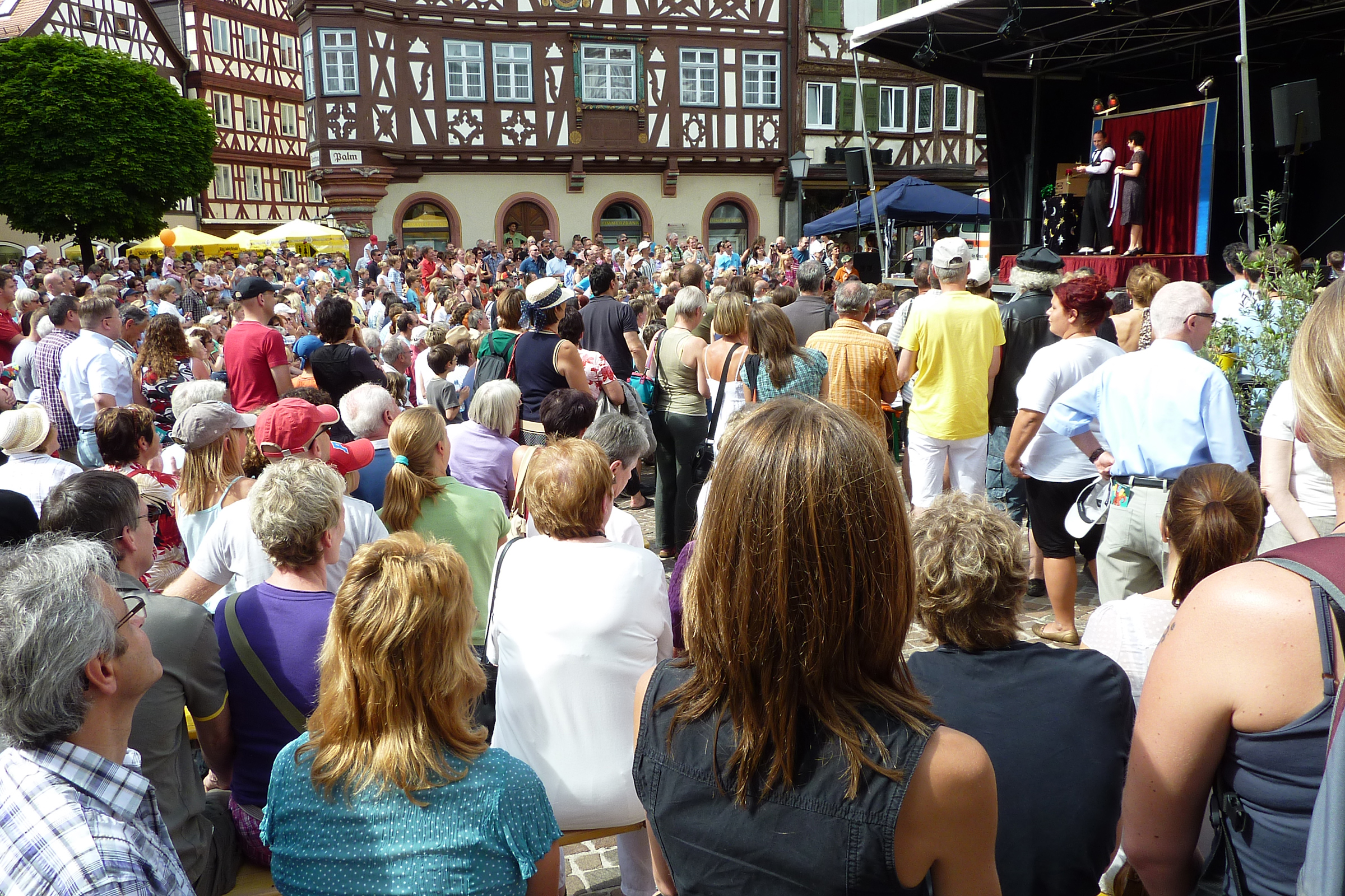 Mosbacher Sommer 2010, Marktplatz